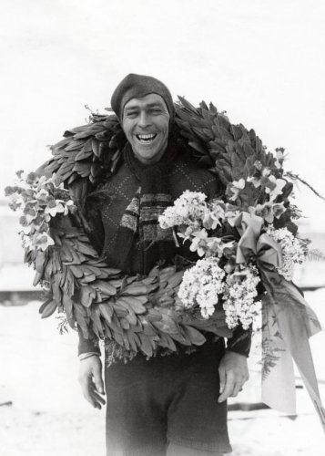 Tweede Wereldoorlog. Schaatsen. Elfstedentochten. De winnaar Auke Adema van de zesde Elfstedentocht, uit Franeker, met een grote krans om zijn schouders . Nederland, Leeuwarden, 6 februari 1941.